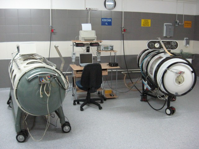 Баросала са једномесним хипербаричним коморама и пратећом опремом Аутор др М.Димић, 2008 г